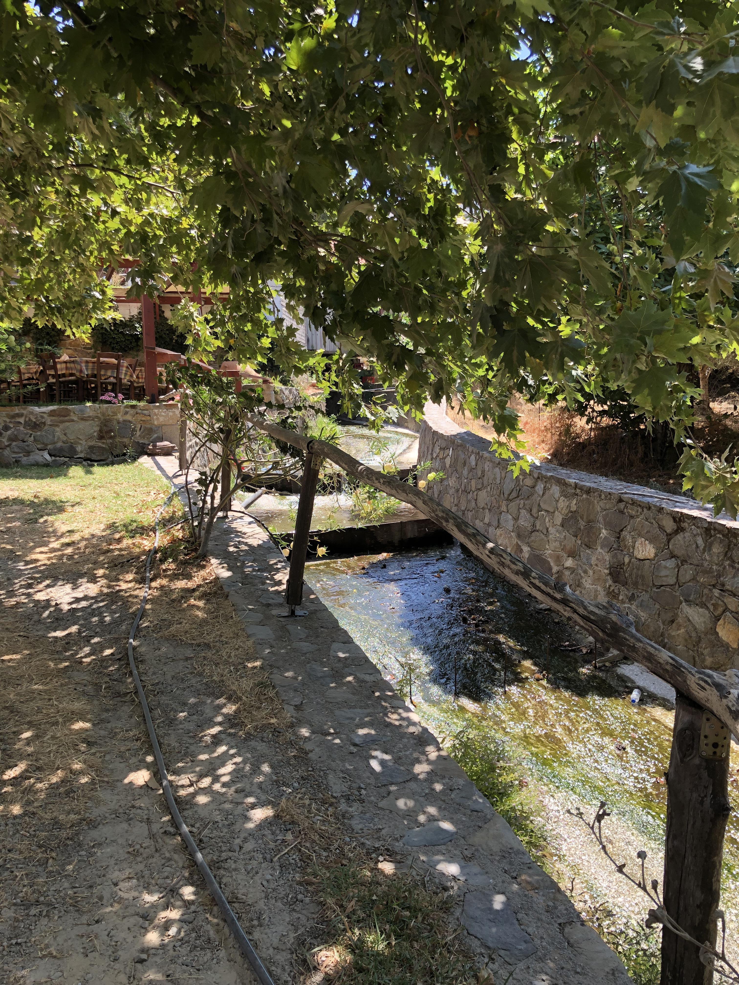 Élos (dème de KIssamos, Crète). Ruisseau traversant le centre du village, en eau même au mois d'août.